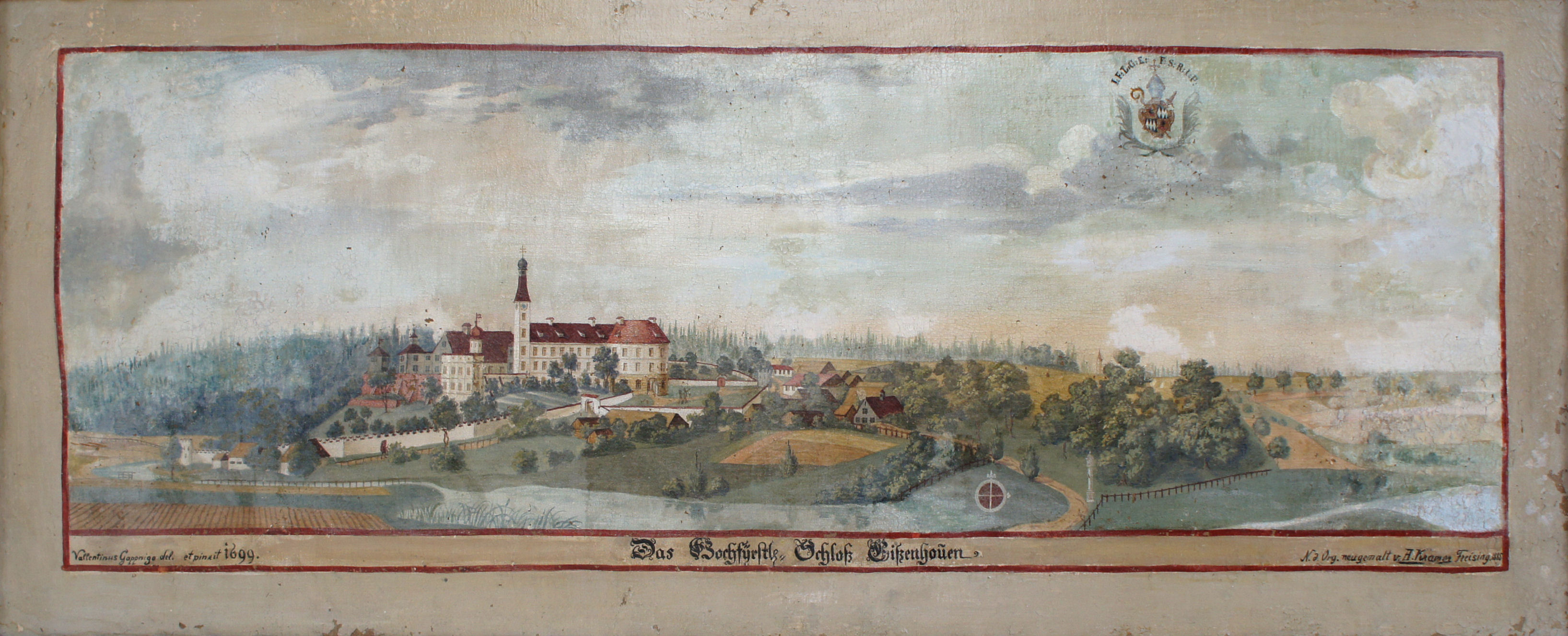 "Das Hochfürstl. Schloss Eisenhofen" - Gemälde aus einer Serie mit Darstellungen von Besitztümern des Hochstifts Freising im Fürstengang zwischen Fürstbischöflicher Residenz und Freisinger Dom.